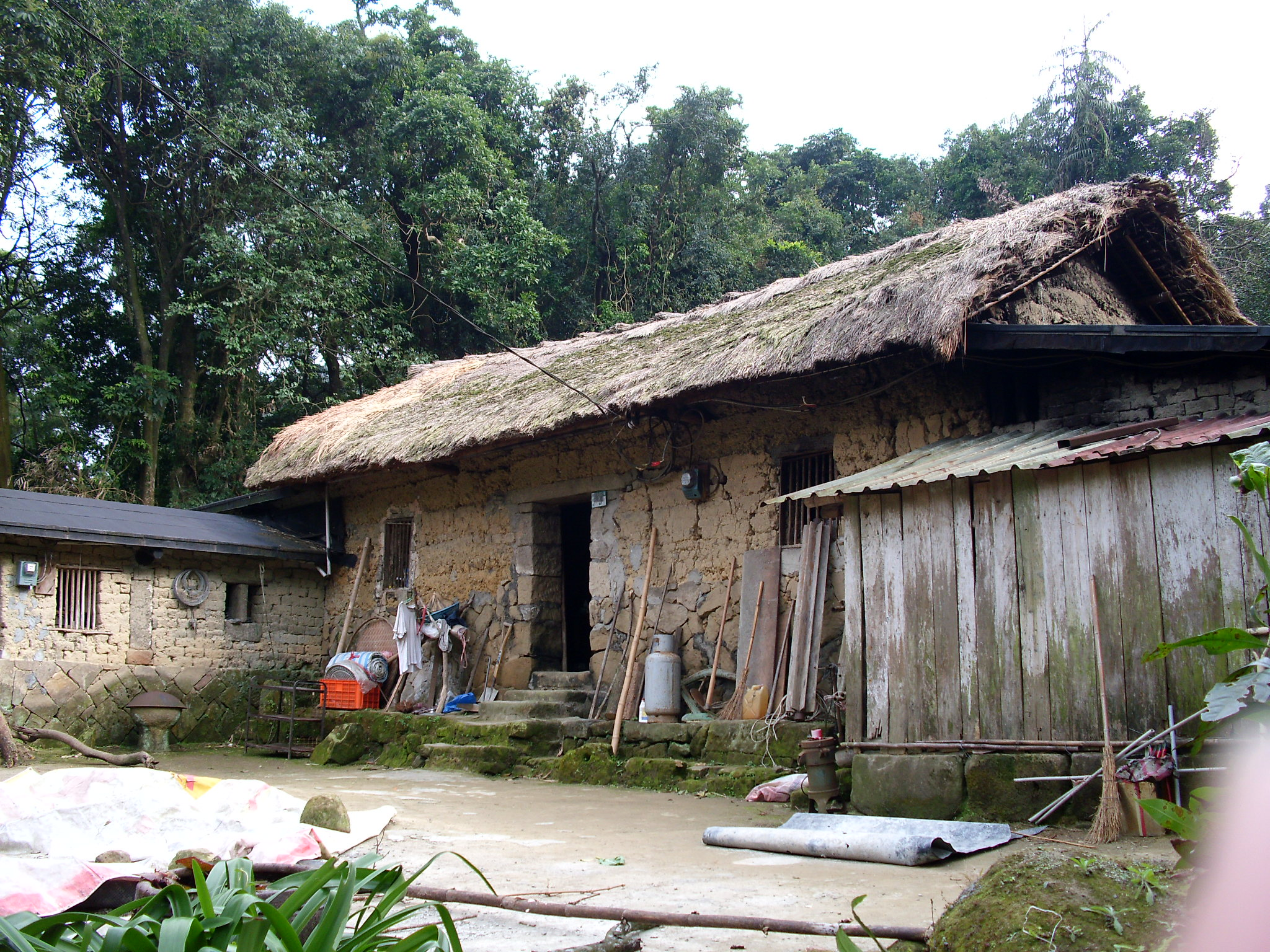 Bân-lâm-gú: 林家草厝，佇新北市深坑區炮仔崙(phau-á-lūn)。